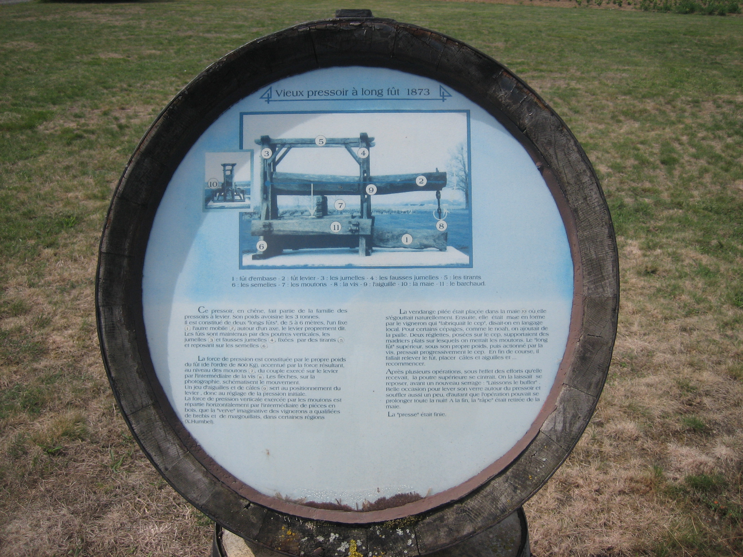 Vieux pressoir à long fût 1873